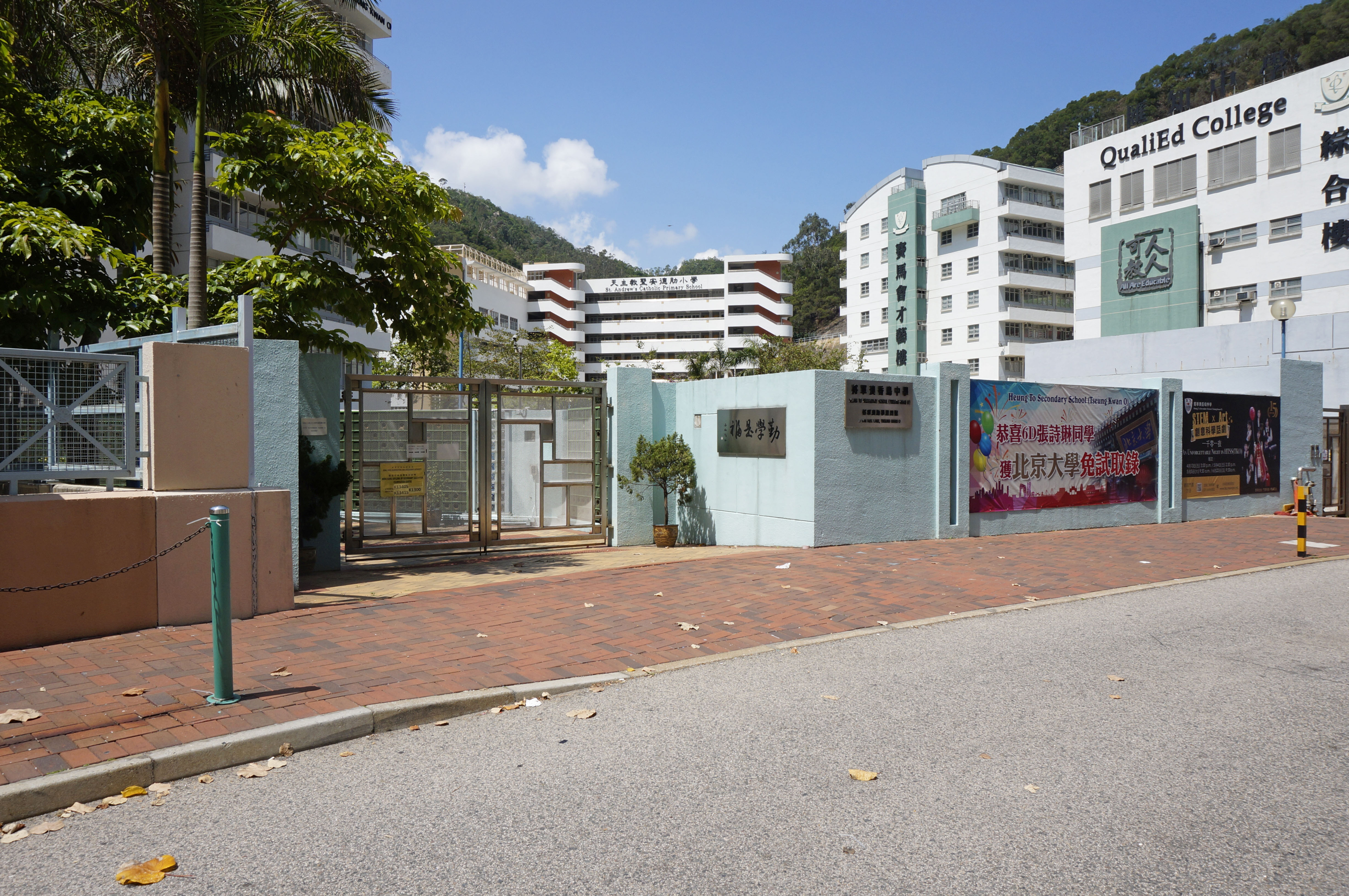 將軍澳香島中學調景嶺校舍正門